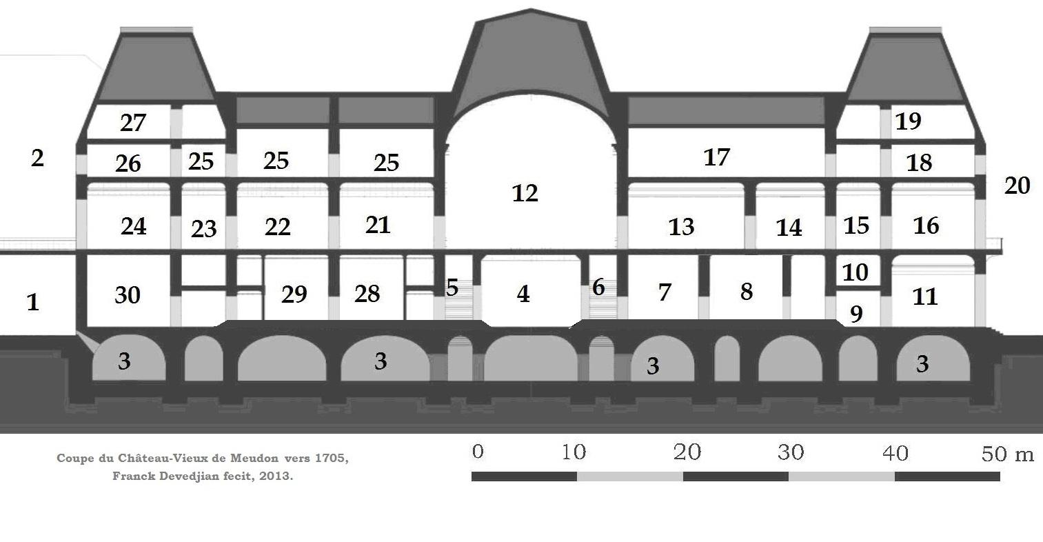 Coupe du Château-Vieux de Meudon, vers 1705.